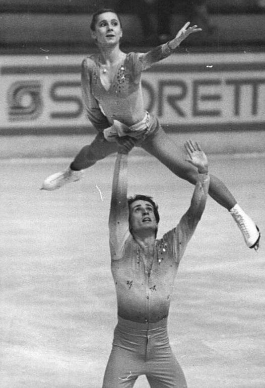 Birgit Lorenz, Knut Schubert ADN-ZB Thieme 26.11.82 Karl-Marx-Stadt: "Pokal der Blauen Schwerter" im Eiskunstlaufen- Das Berliner Dynamo-Paar Birgit Lorenz und Knut Schubert zeigte am 25.11.82 die beste Kür und erhielt für sein mit viel Schwung vorgetragenes Programm (hier bei einer Hebefigur) die höchsten Noten. Mit 1,4 Punkten gewannen sie den Pokal bei den Paaren.